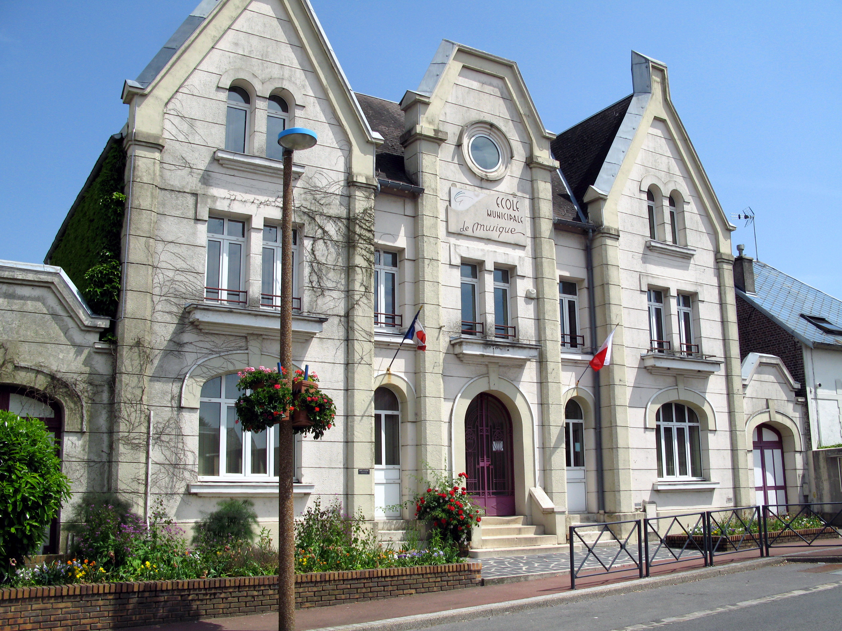 Gauchy (Aisne, France) - L'école de musique.